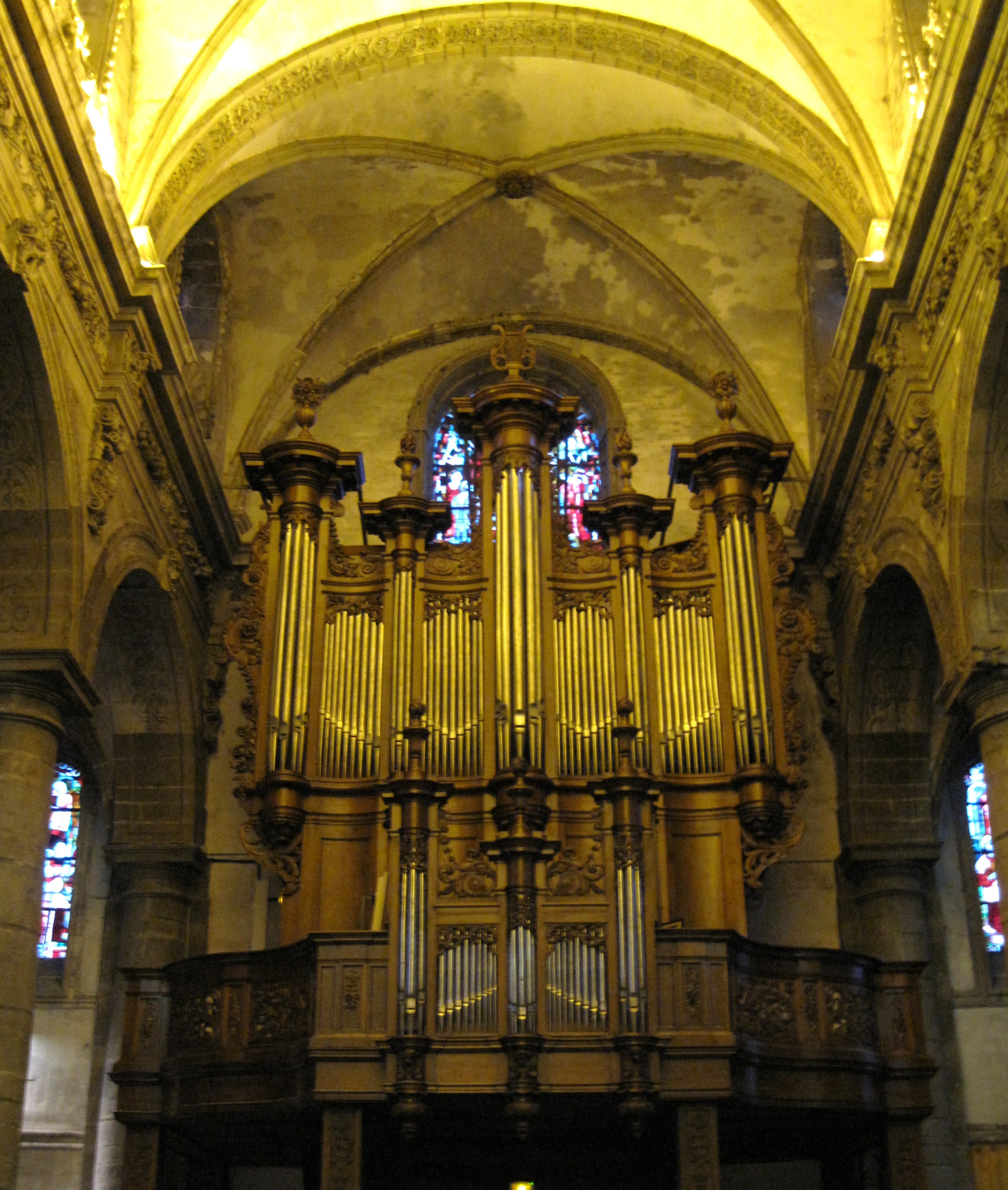 Orgue de l'abbatiale Saint-Martin du Cateau-Cambrésis (59).